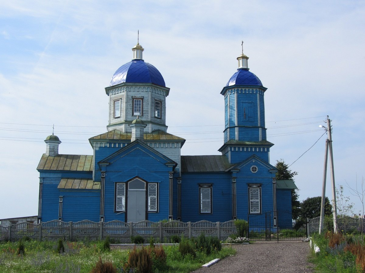 Глыбоцкае. Свята-Раства-Багародзіцкая царква